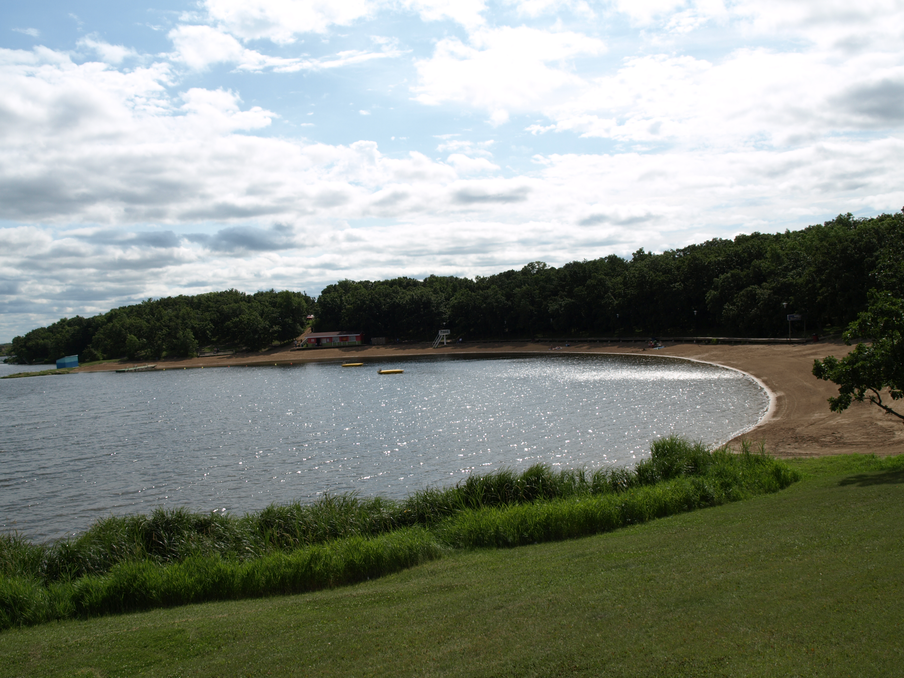 Morden Manitoba Canada